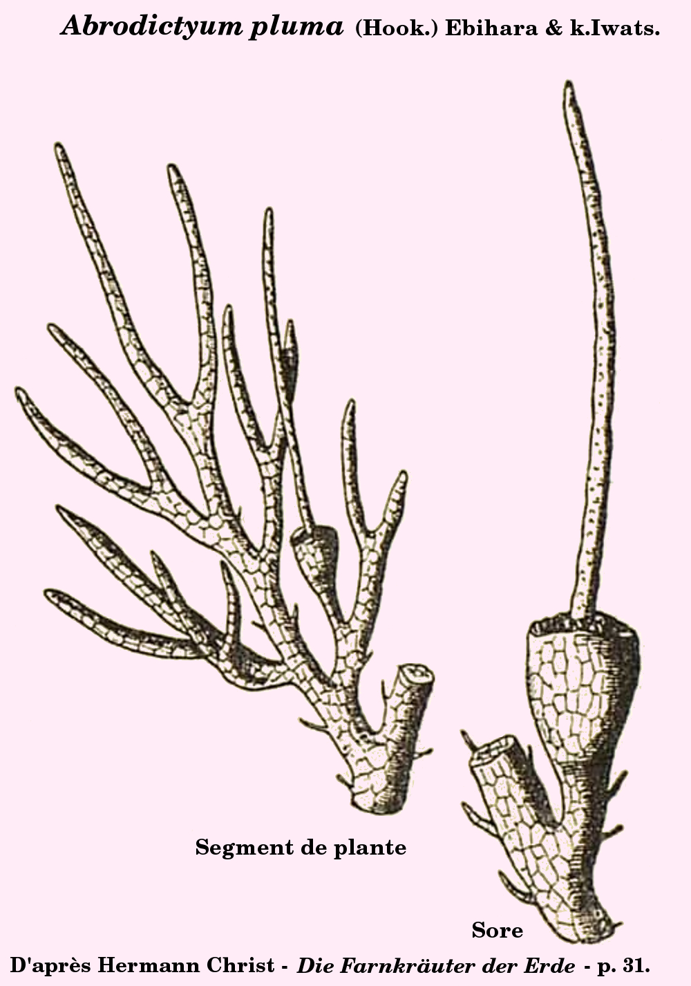 Abrodictyum pluma - Schéma tiré de Farnkraüter der Erde - Conrad Hermann Christ - 1897 - p. 31. - Image traitée sous Gimp par D. Prévôt.